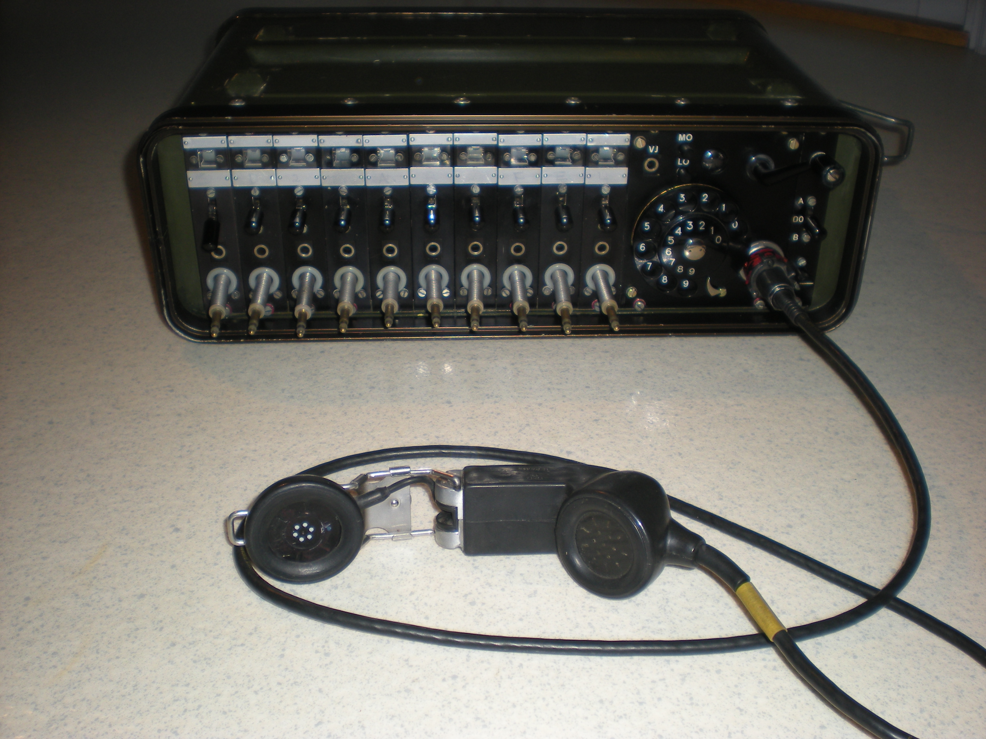 Amatörbild av framsidan till Telefonväxel 10 DL, 2B.